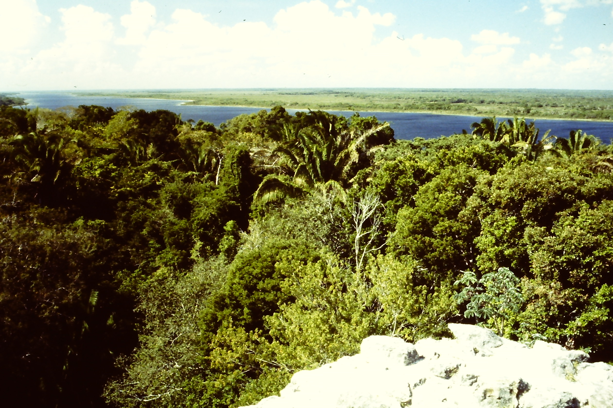 New River, Belize von Lamanai aus